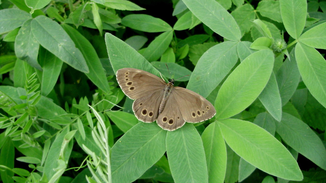 Lopinga achine. Veseluvka, Jonava district, Lithuania.